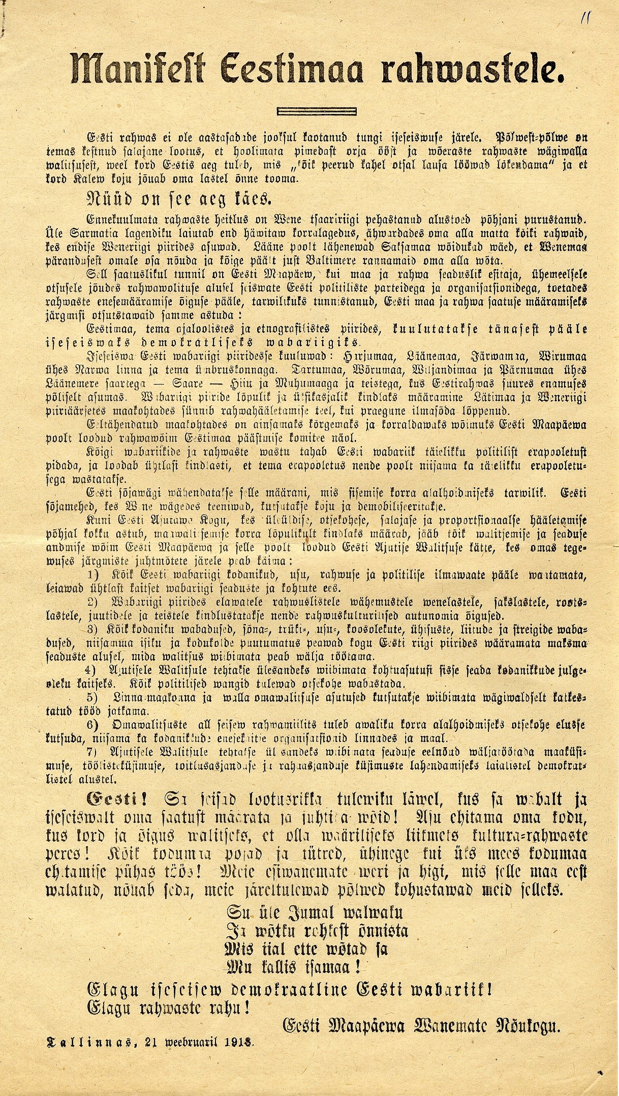 Eesti iseseisvusmanifest algses sõnastuses nagu seda levitati enne 24.02.1918